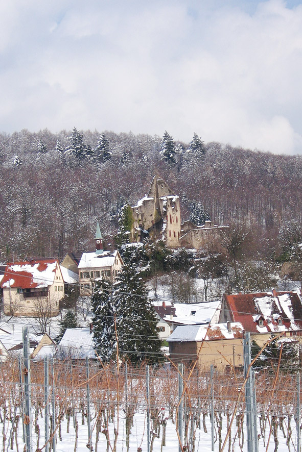 Burg Landeck im Schnee